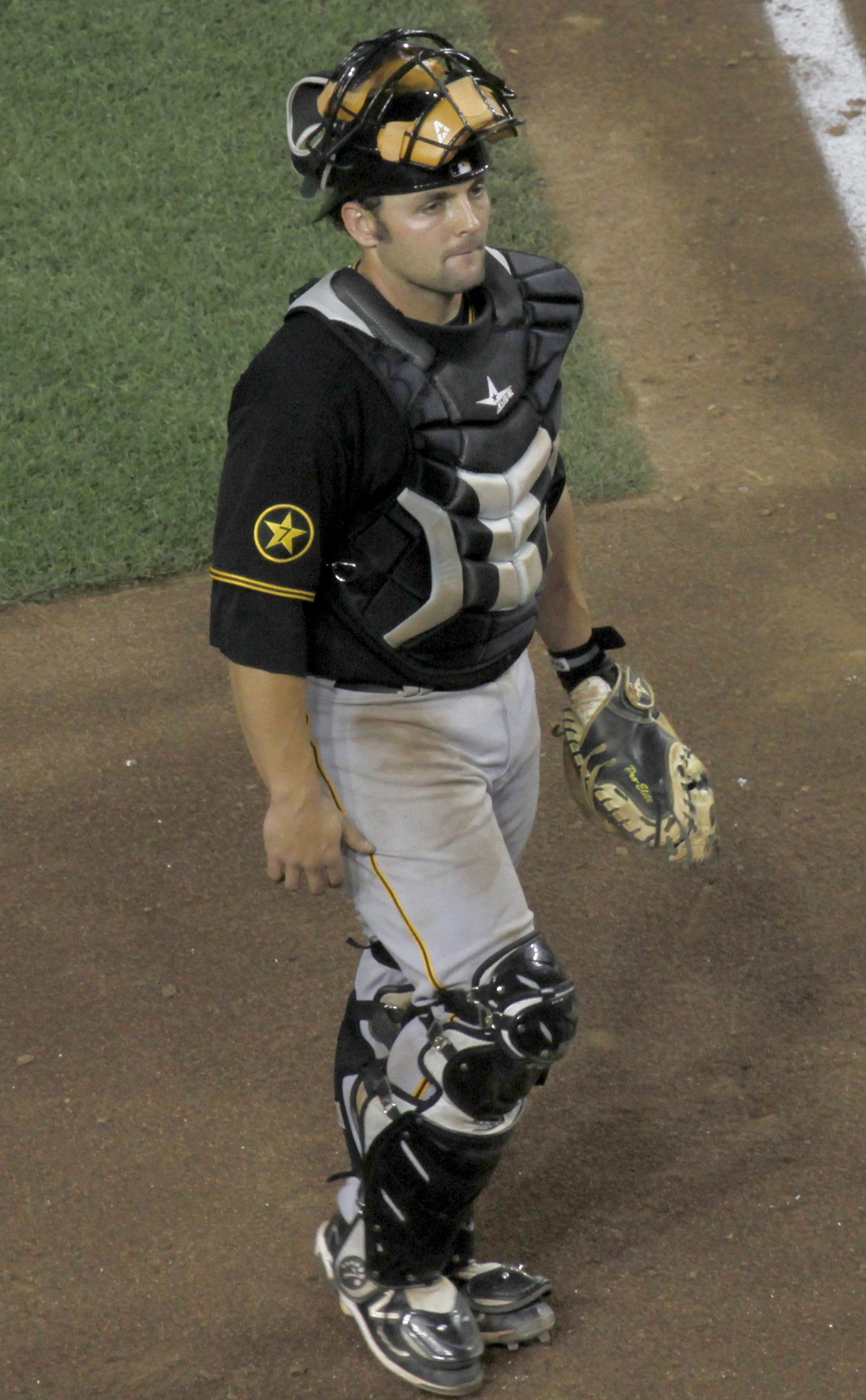 Michael McKenry